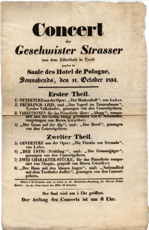 Programmzettel für ein Konzert der Geschwister Strasser im Saal des Hotels Pologne in Leipzig 1834